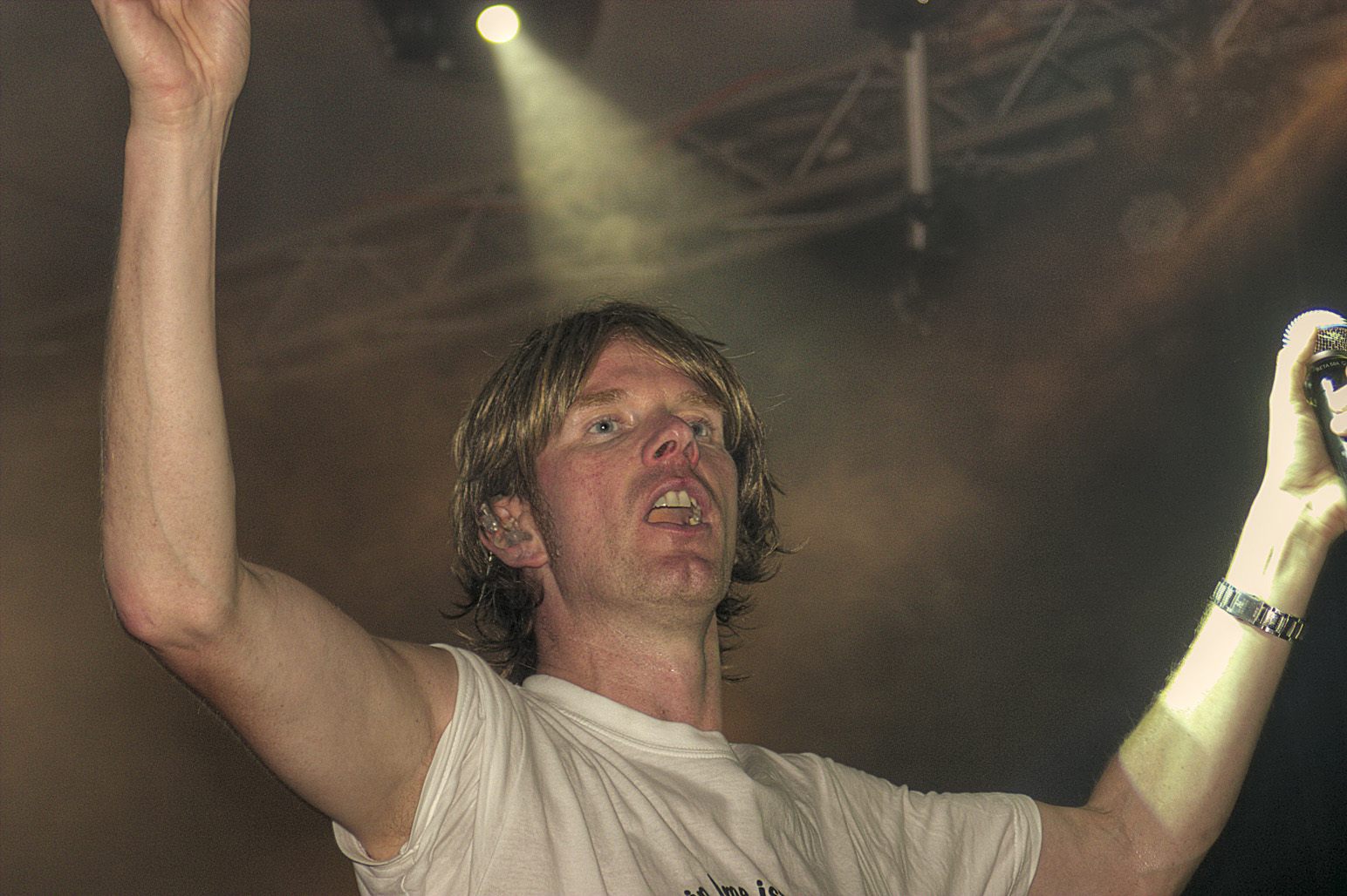 Mickie Krause